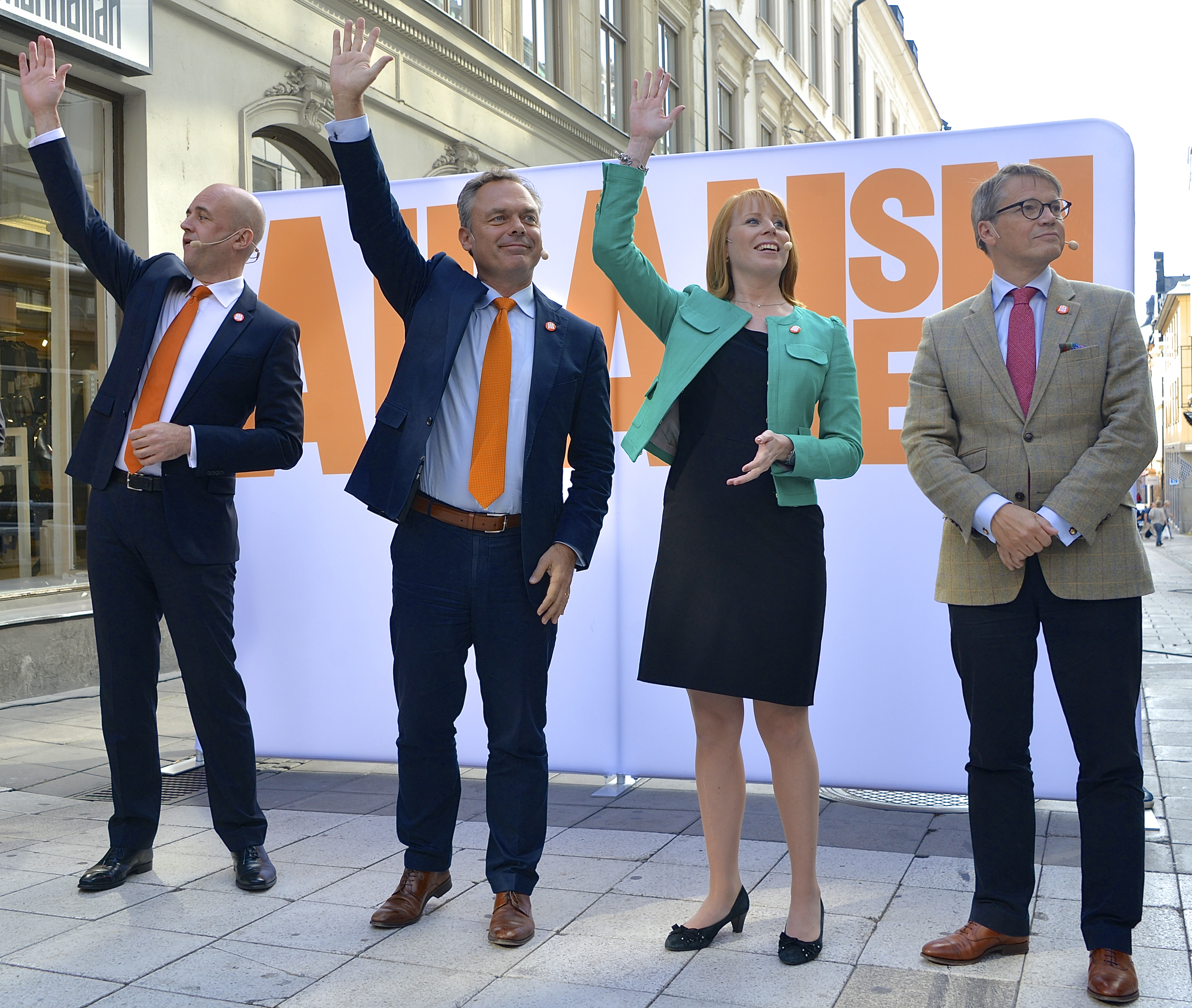 Alliansledarna Fredrik Reinfeldt, Jan Björklund, Annie Lööf och Göran Hägglund framträder en sista gång dagen för valet den 14 september 2014. Plats: Drottninggatan utanför PUB i Stockholm.